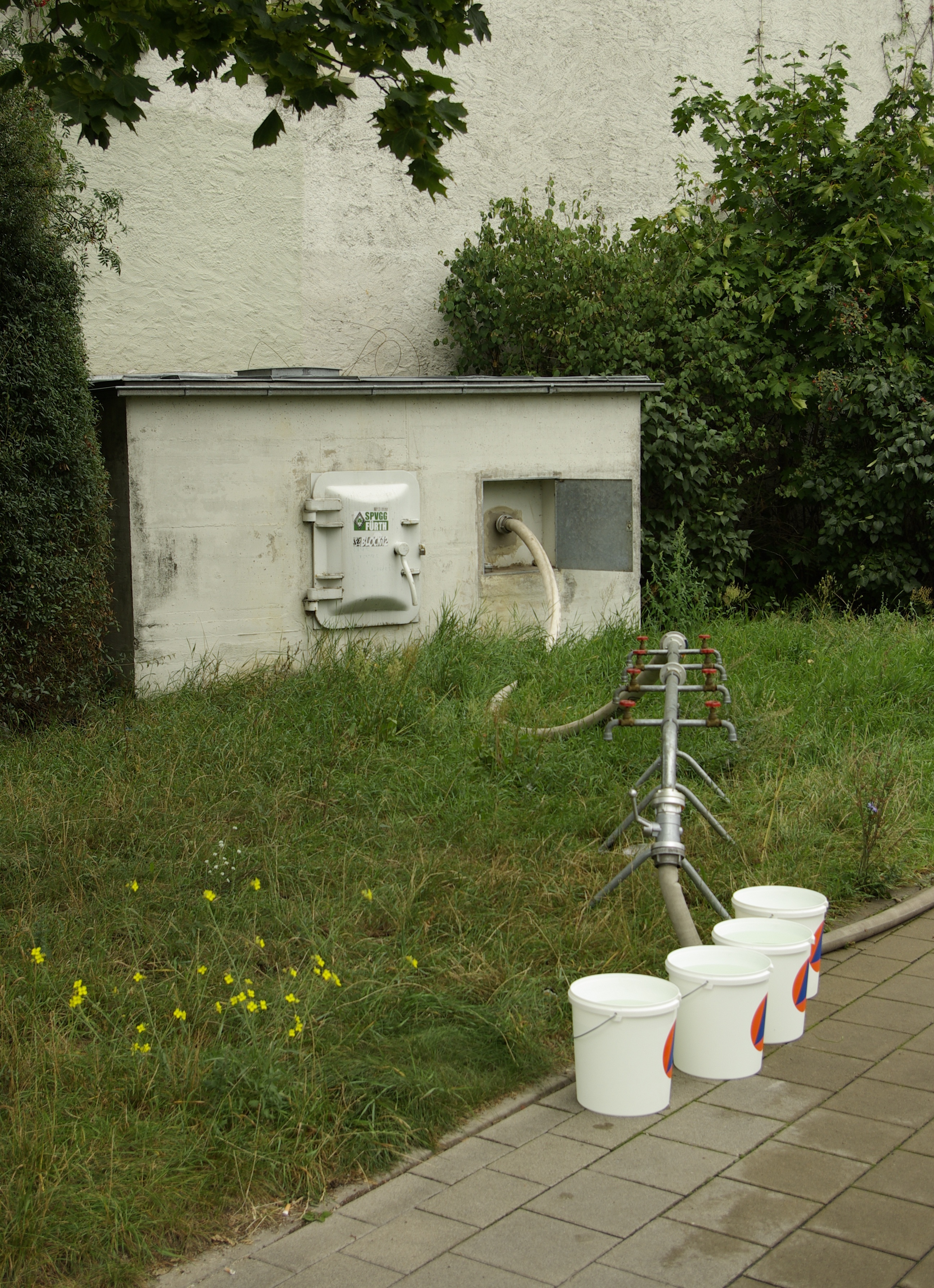 Trinkwassernotbrunnen am Hochbunker in der Kronacher Straße in Fürth